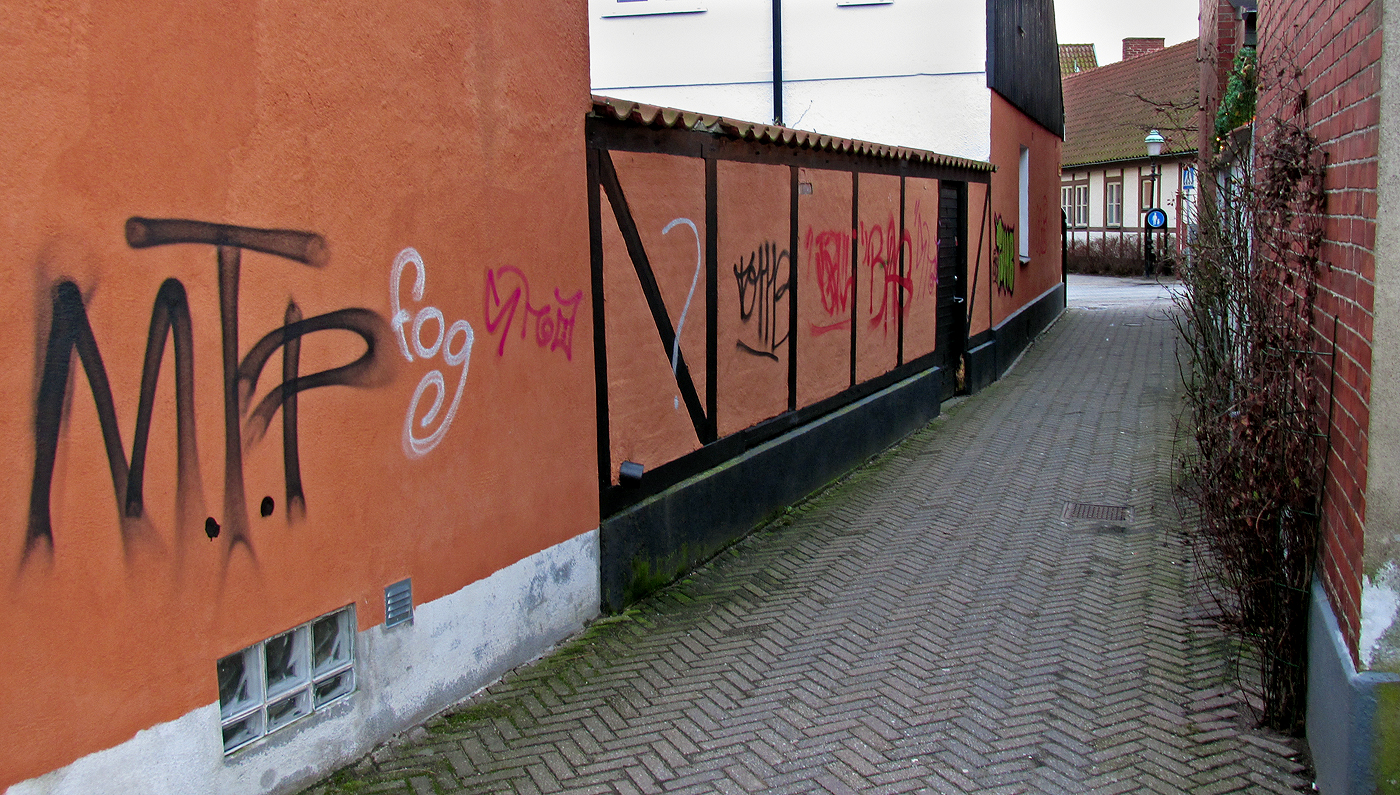 Graffiti, här i form av Tags, är en typ av vandalism. Åfåran 15 feb 2014 Ystad.